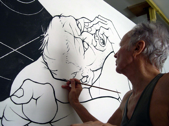 Portrait de Pierre-Yves Trémois